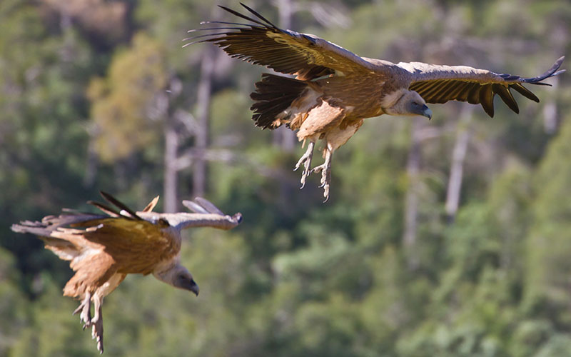 Buitres (Gyps fulvus) en Mequinenza (Zaragoza).